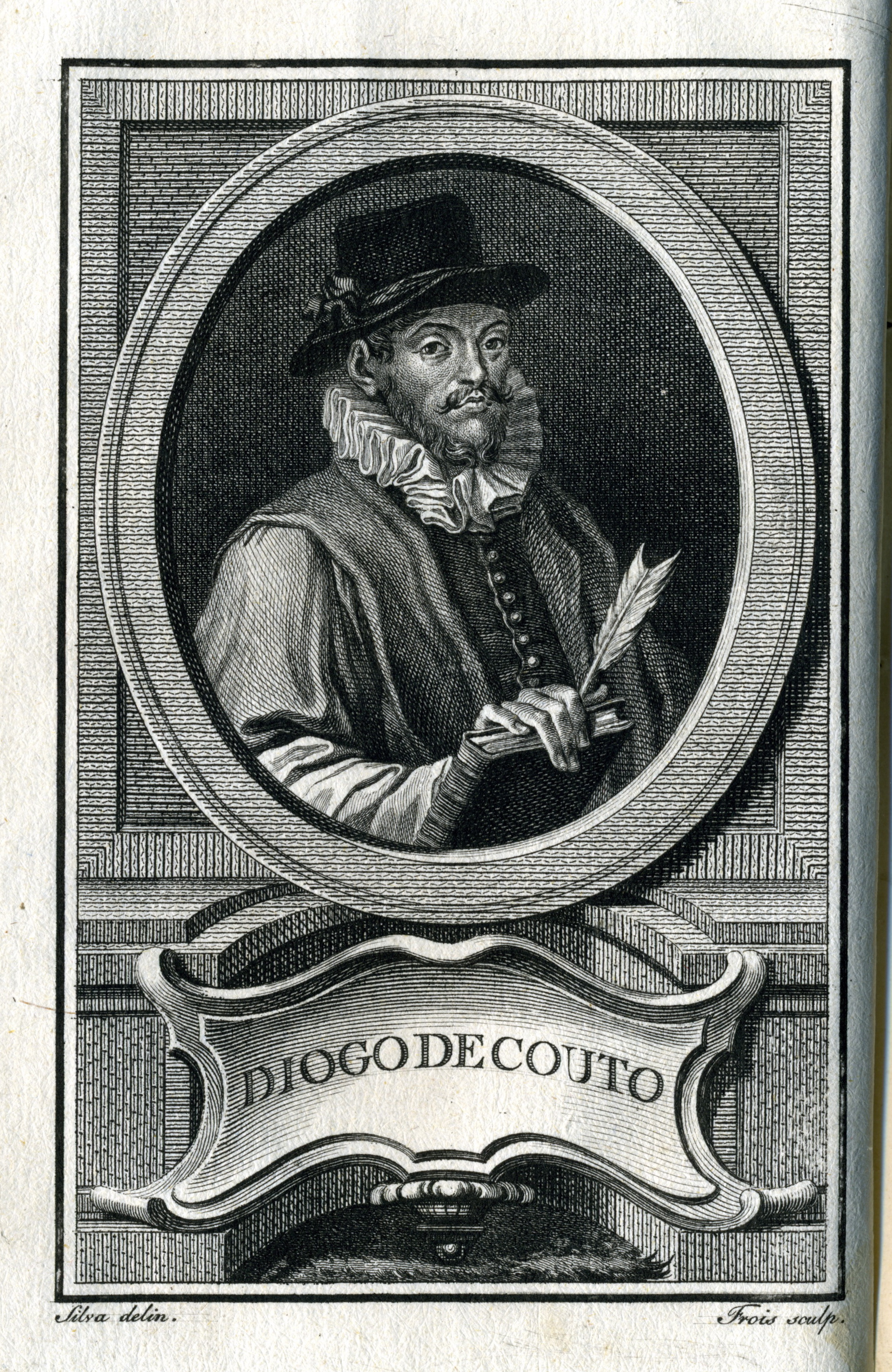 Diogo do Couto, in Décadas da Ásia, 1777-1778